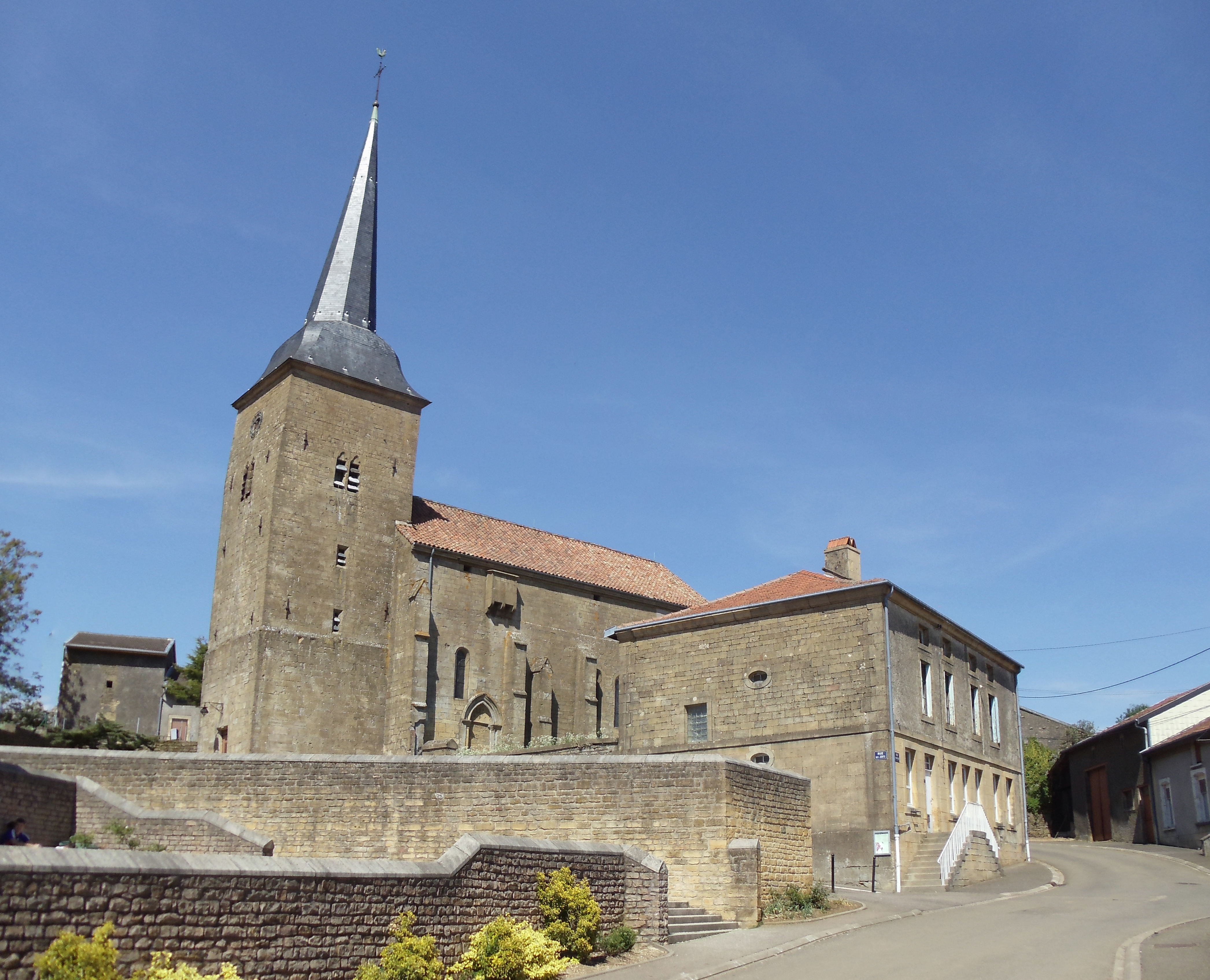 L'église de Fresnois-la-Montagne (Meurthe-et-Moselle)